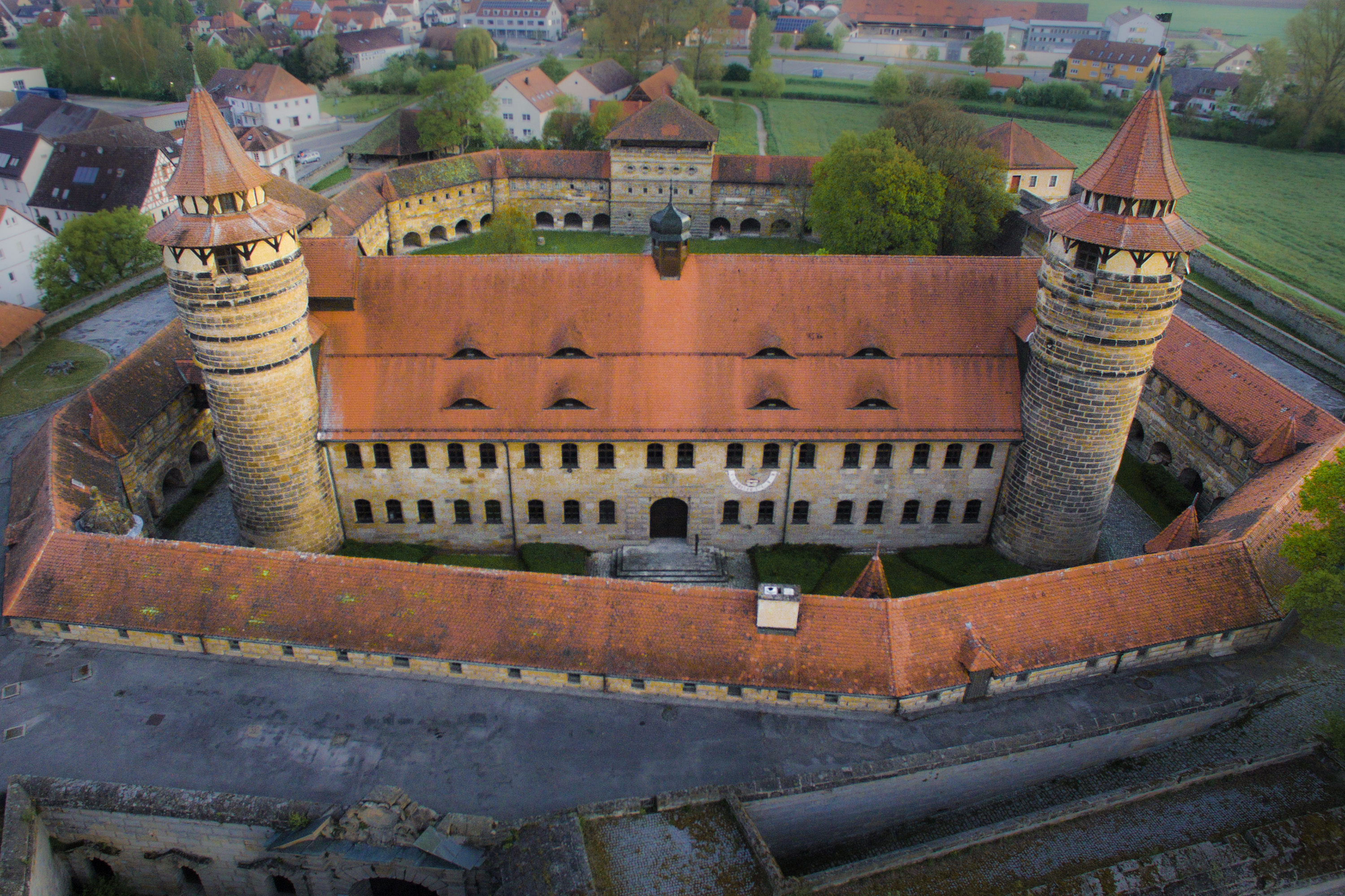 Festung Lichtenau aus der Vogel-Perspektive